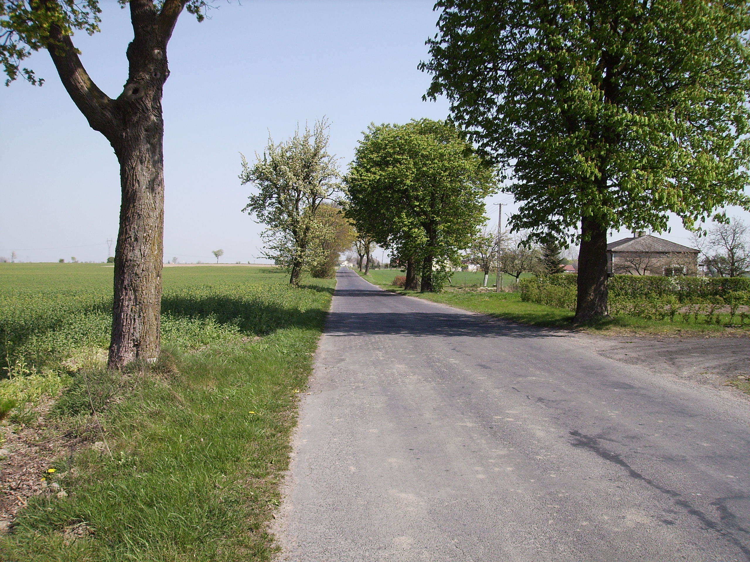 Alejka w Nowym Dworze Królewskim